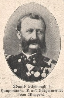 Eduard Schöningh (1823-1900) österreichischer Marineoffizier, Bürgermeister von Meppen, Preußen